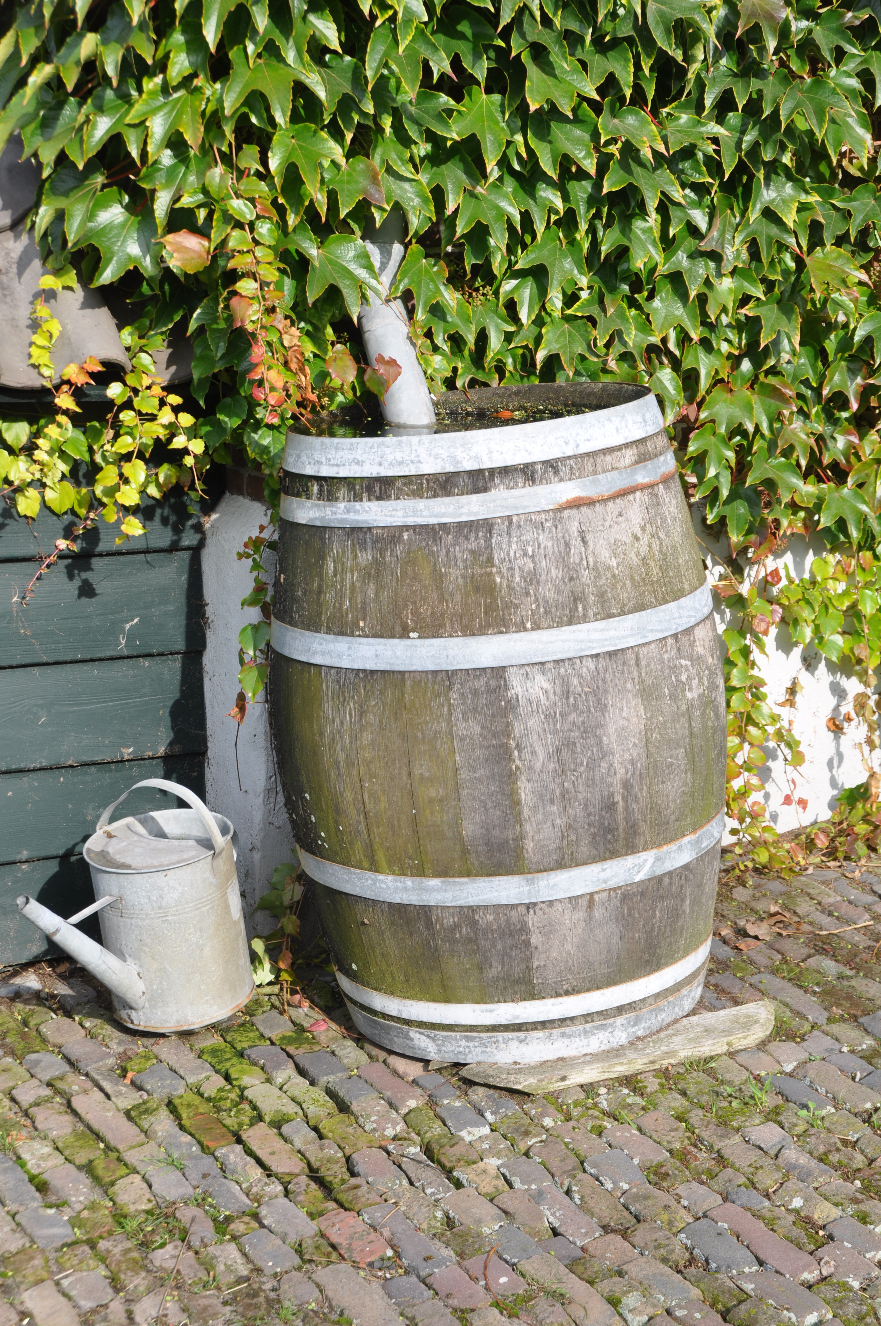 Voorweg 125 in Zoetermeer is een Rijksmonument.